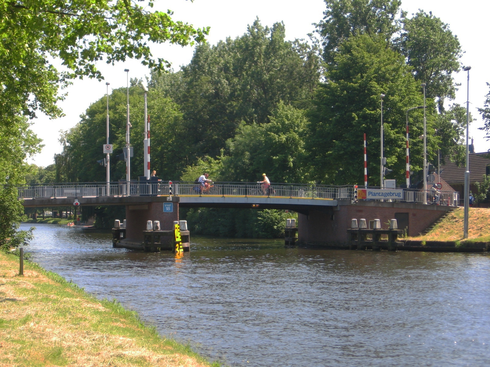 Bridges in Delft, 11 juni